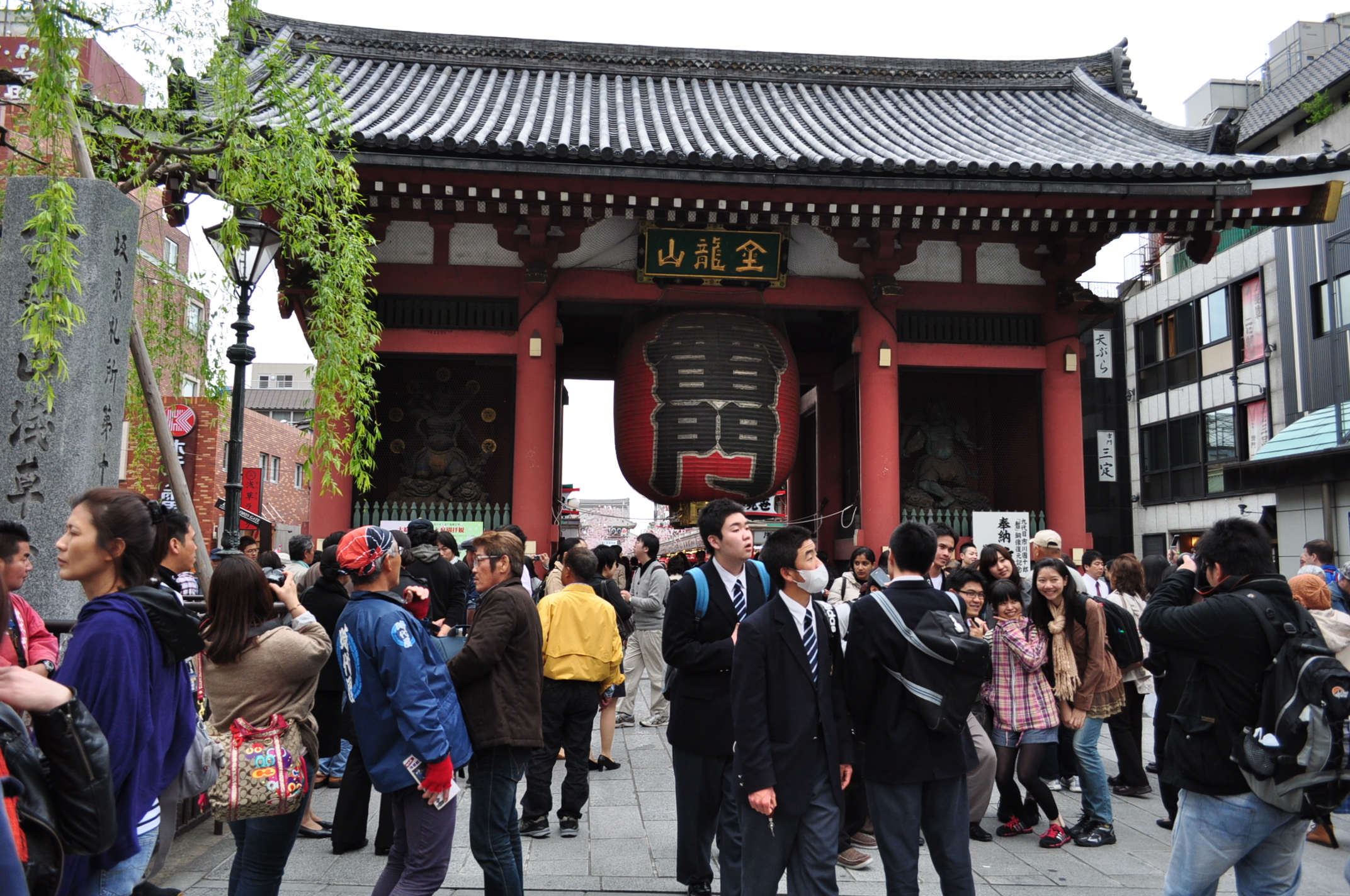 雷門前は何時もにぎわっています